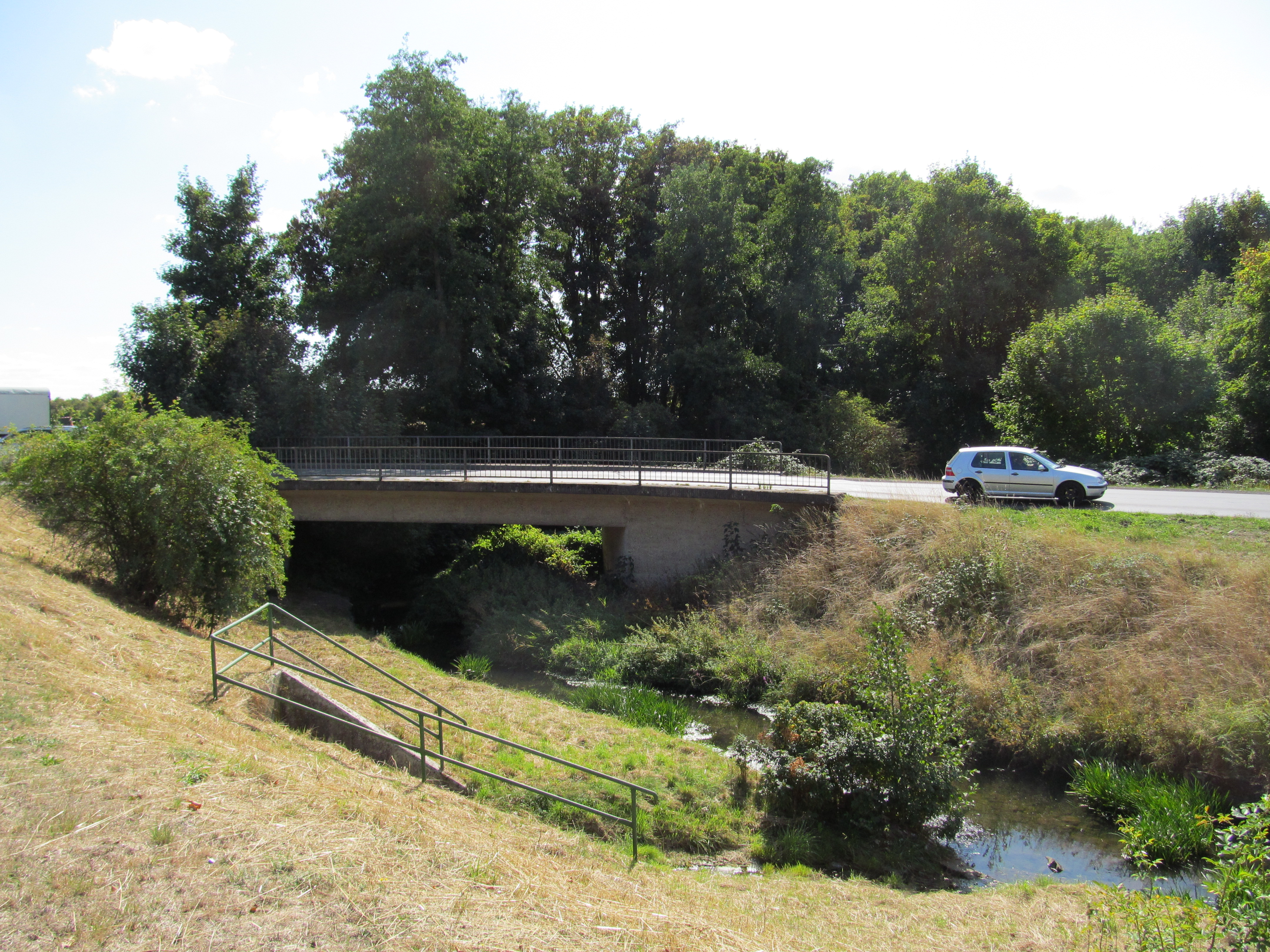 Brücke des Bobenhäuser Weg über den Fluss Olmes